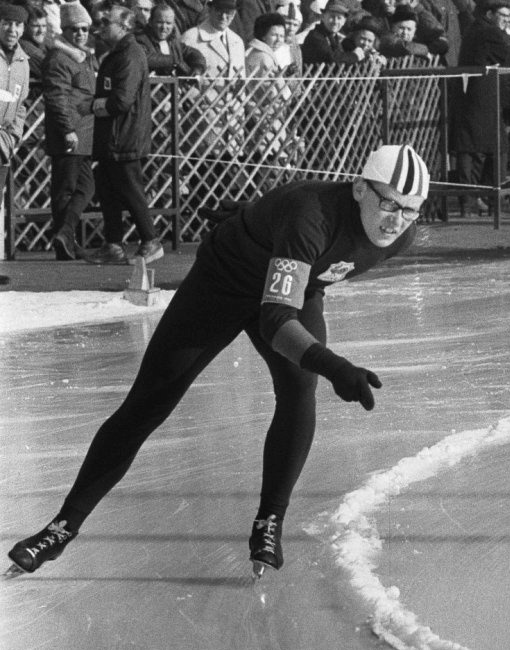 André Kouprianoff, 1964 Olympics